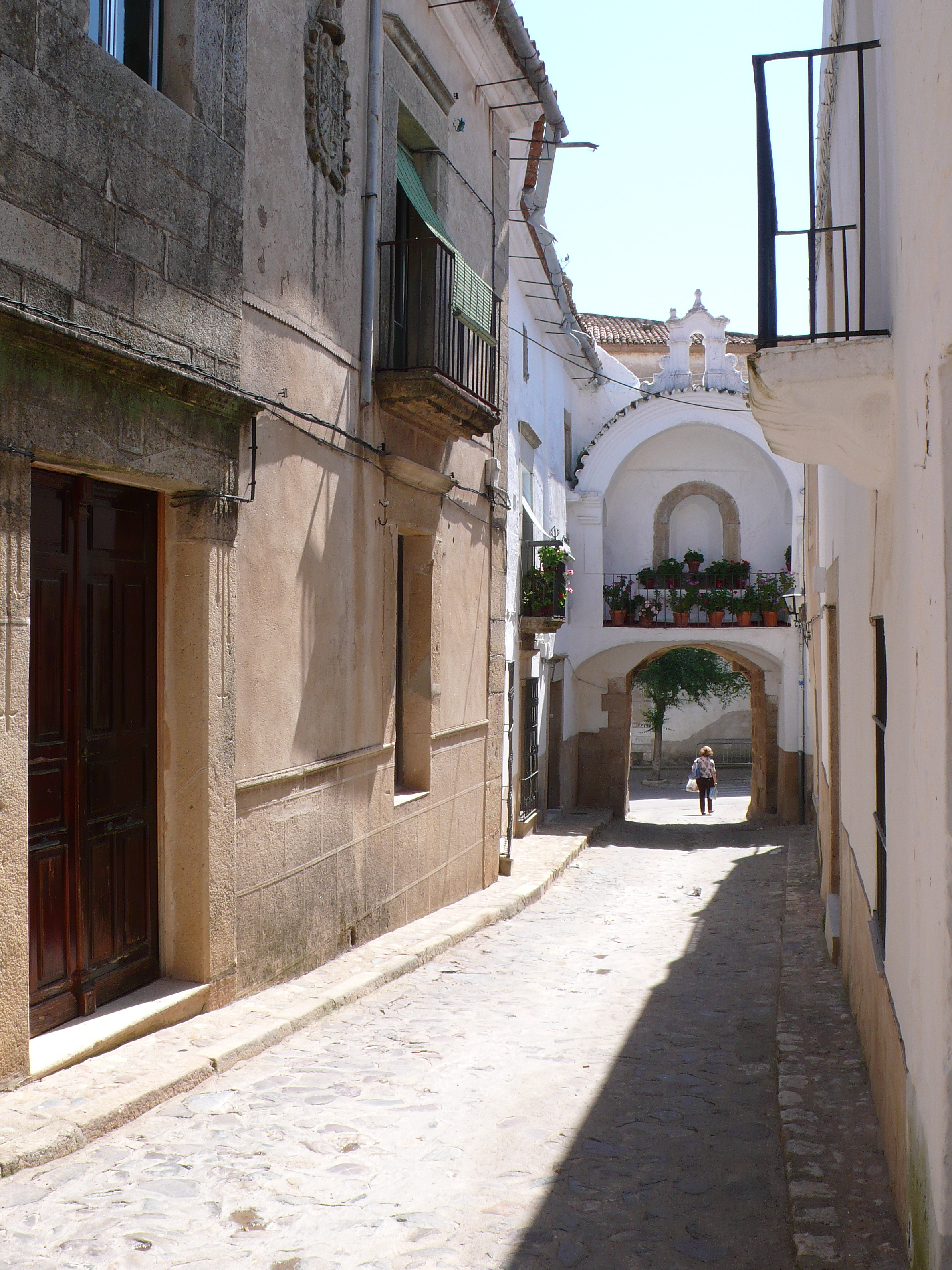 Alburquerque, Villa Adentro.